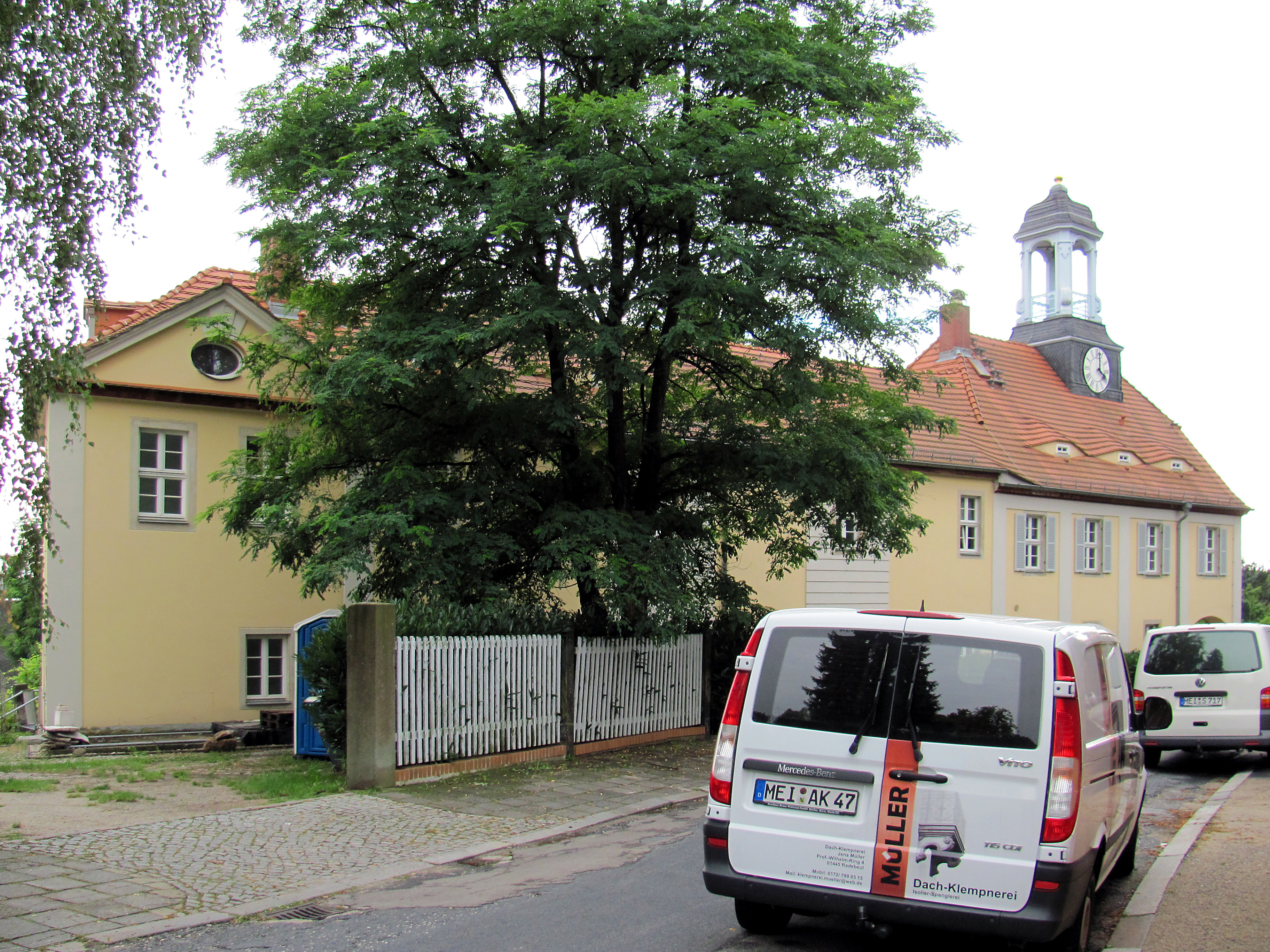 Altfriedstein